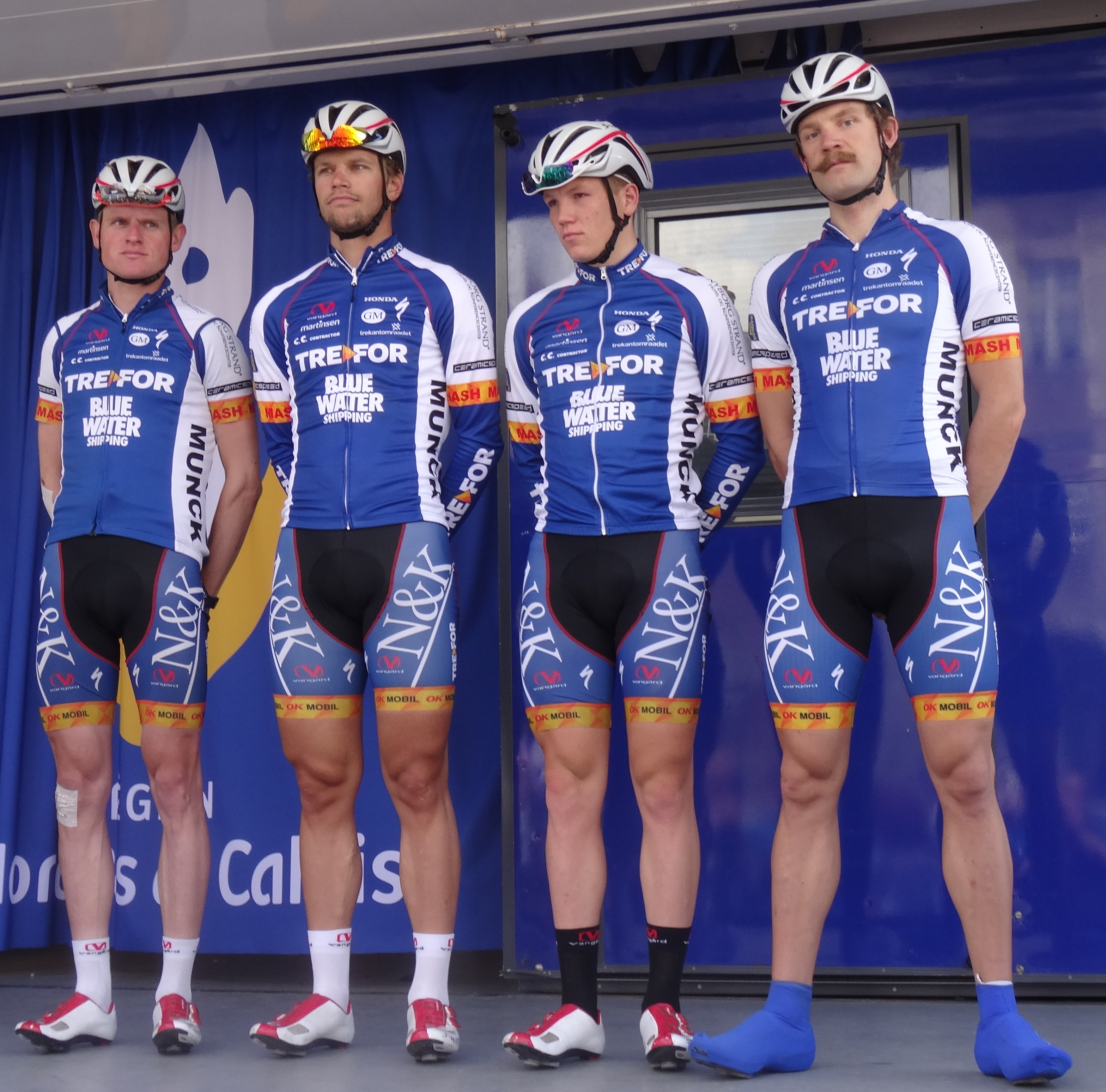 Reportage photographique réalisé le dimanche 25 mai 2014 à l'occasion du départ et de l'arrivée de la troisième étape du Paris-Arras Tour 2014 à Arras, Pas-de-Calais, Nord-Pas-de-Calais, France. Depicted team: Trefor-Blue Water